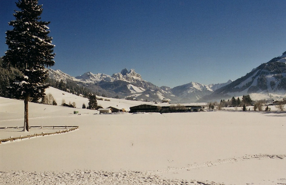 Blick über Grän ins Tannheimer Tal. Im Hintergrund Läuferspitze (1958 m), Gimpel (2173 m), Rote Flüh (2108 m), Hahnenkamm 81938 m) und Gaichtspitze (1986 m)